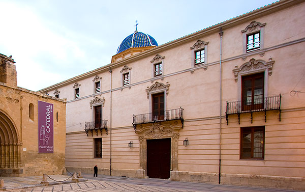 Palacio Episcopal. Orihuela. Fachada delantera del Palacio Episcopal.